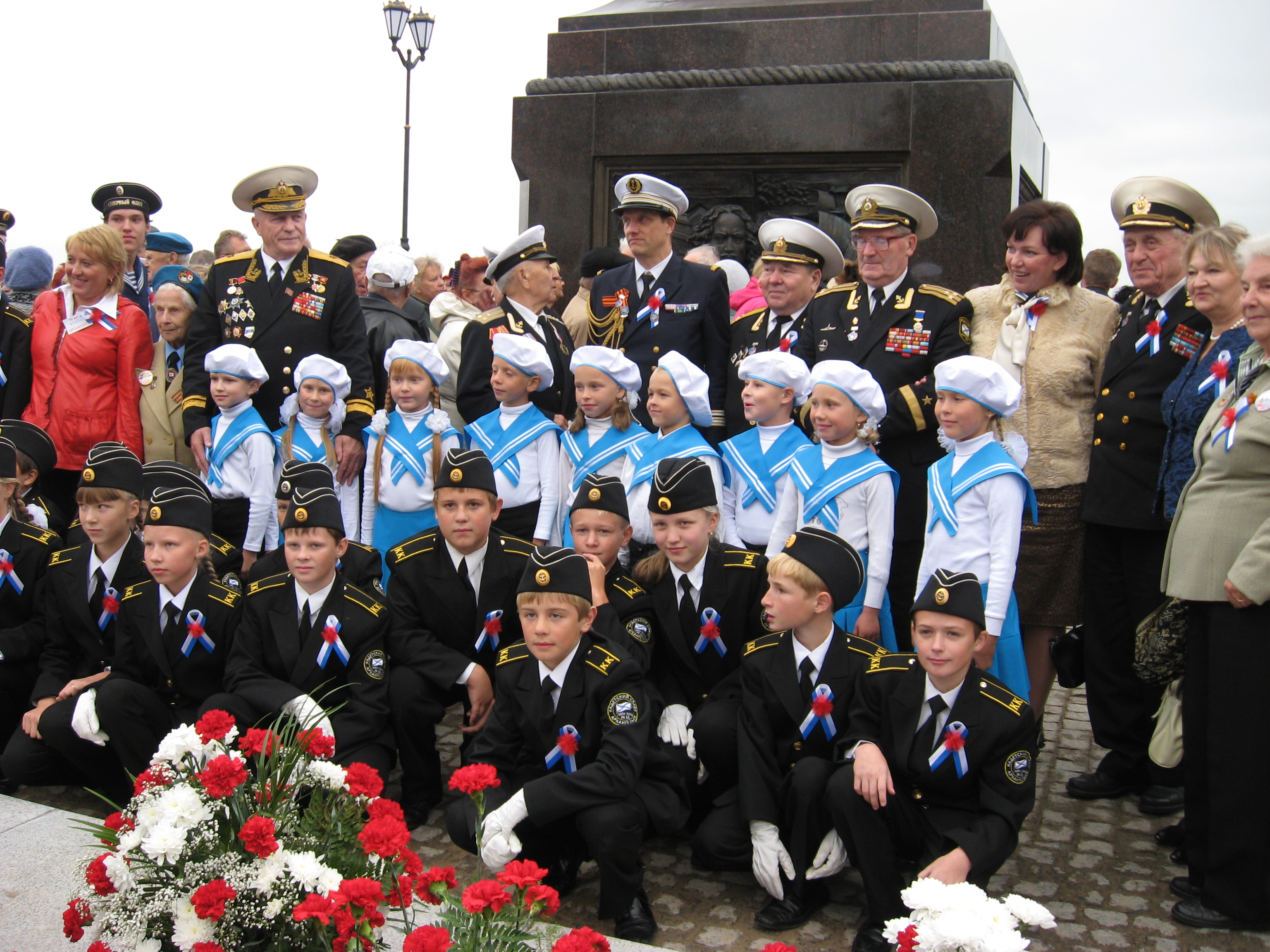 изображение открытия стелы "Город воинской славы" в Архангельске (ветераны и кадеты у подножия памятника)